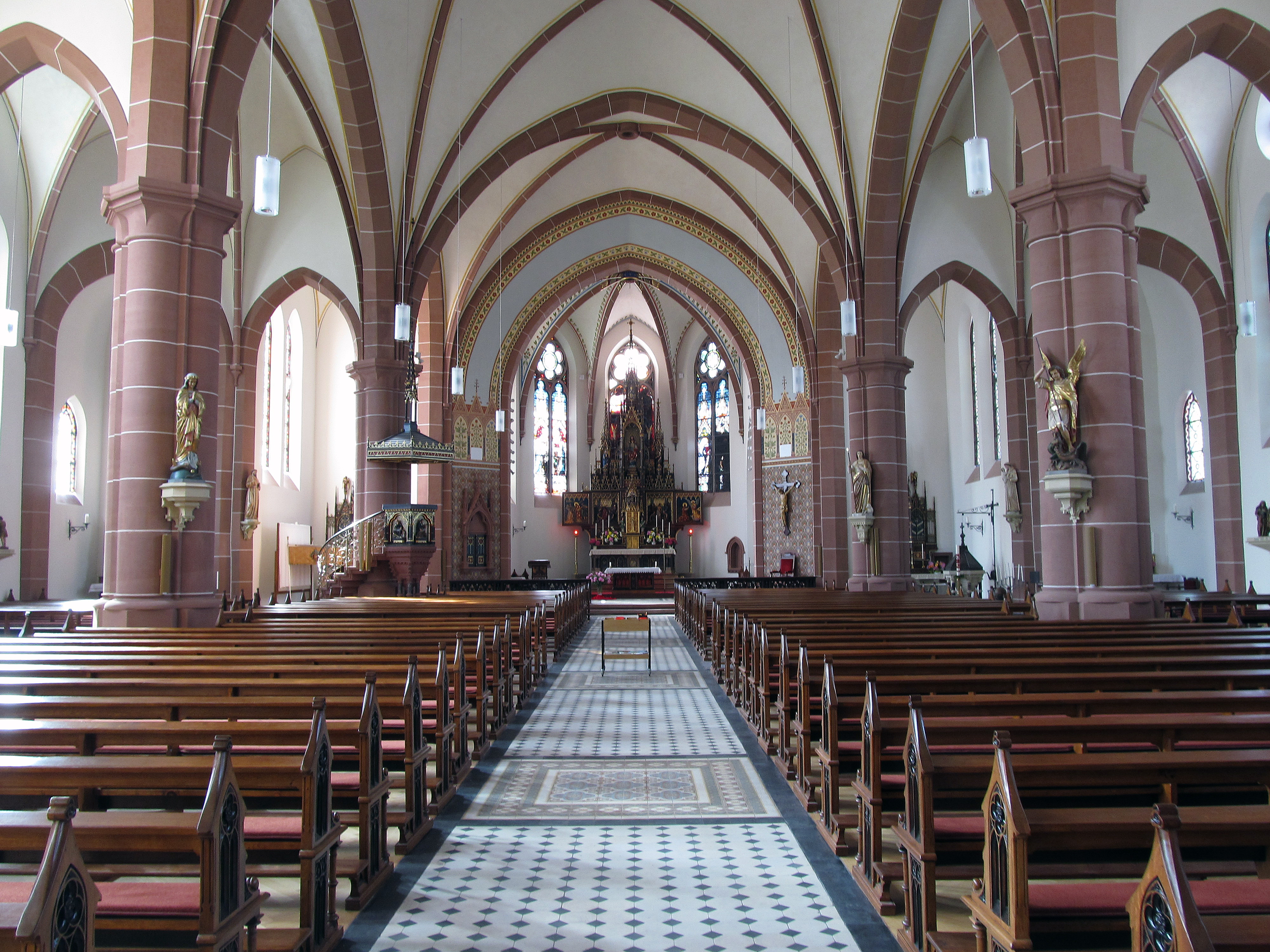 St. Josef (St. Ingbert), Blick Richtung Hauptaltar